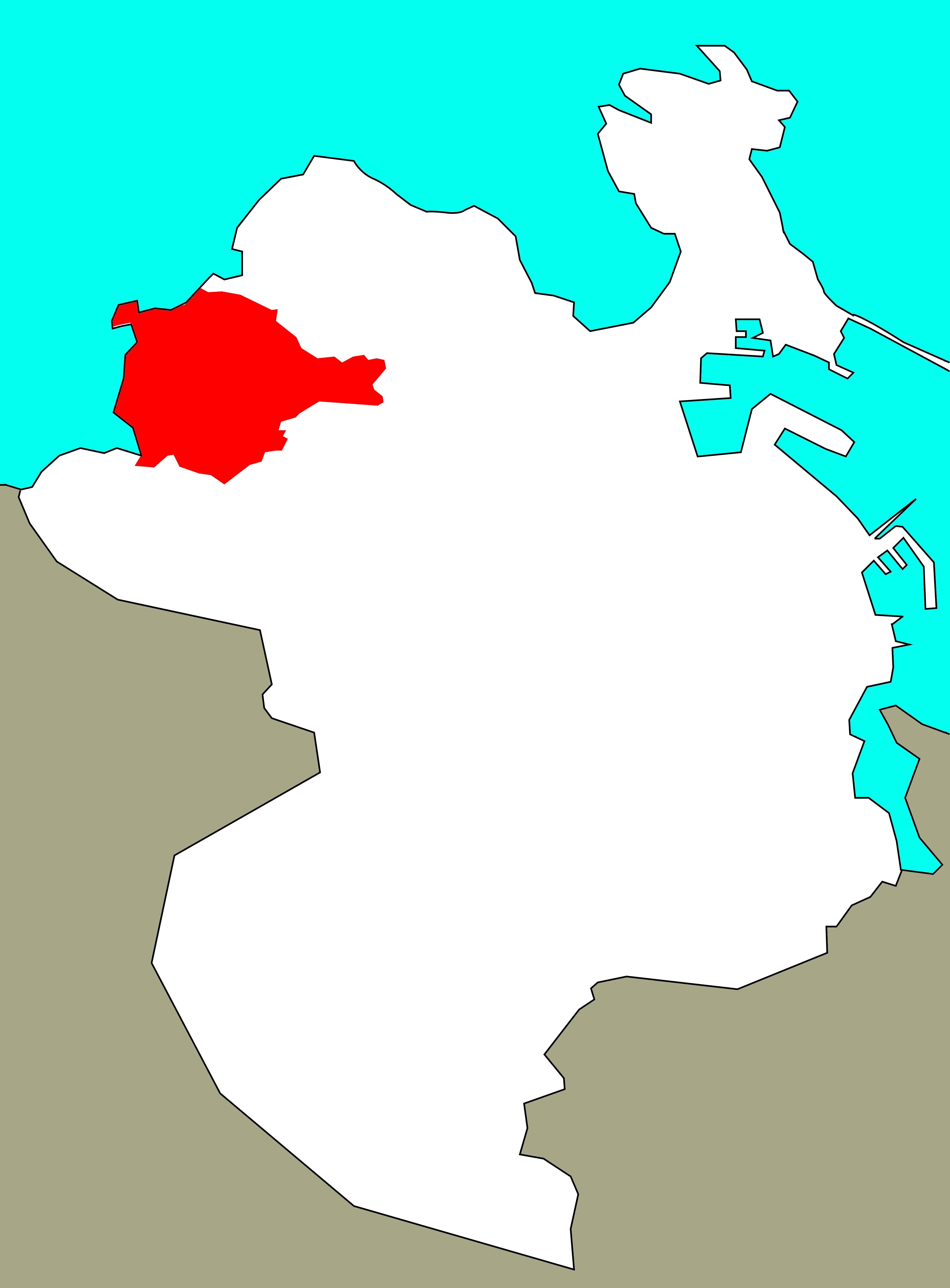 Situación de Bens no concello da Coruña.[1]